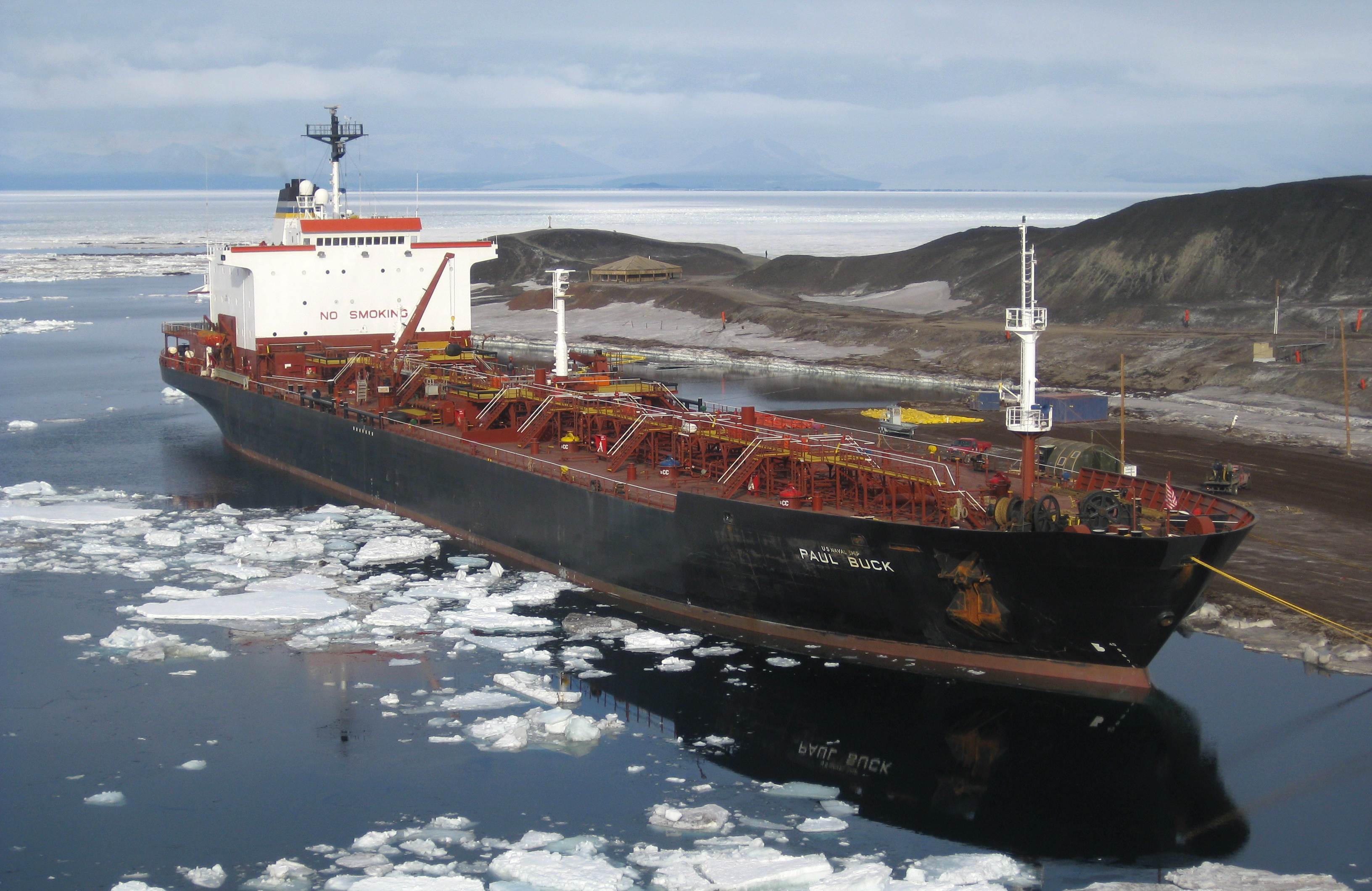 Antarctica: USNS Paul Buck